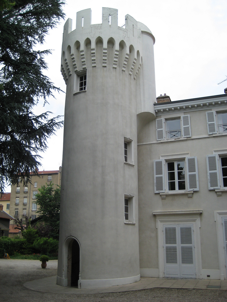 Tour d'angle sud-ouest du château de Montchat, crénelée avec machicoulis et portant sur son flan nord une poivrière. Cette tour résulte d'une restauration durant le XIXème siècle